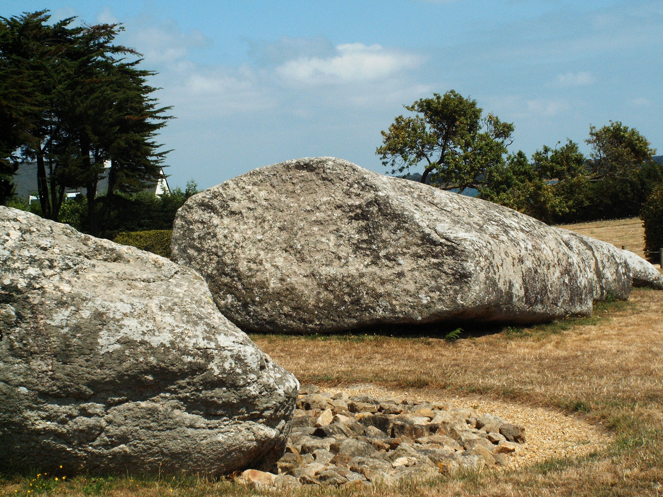 Locmariaquer - Großer Menhir